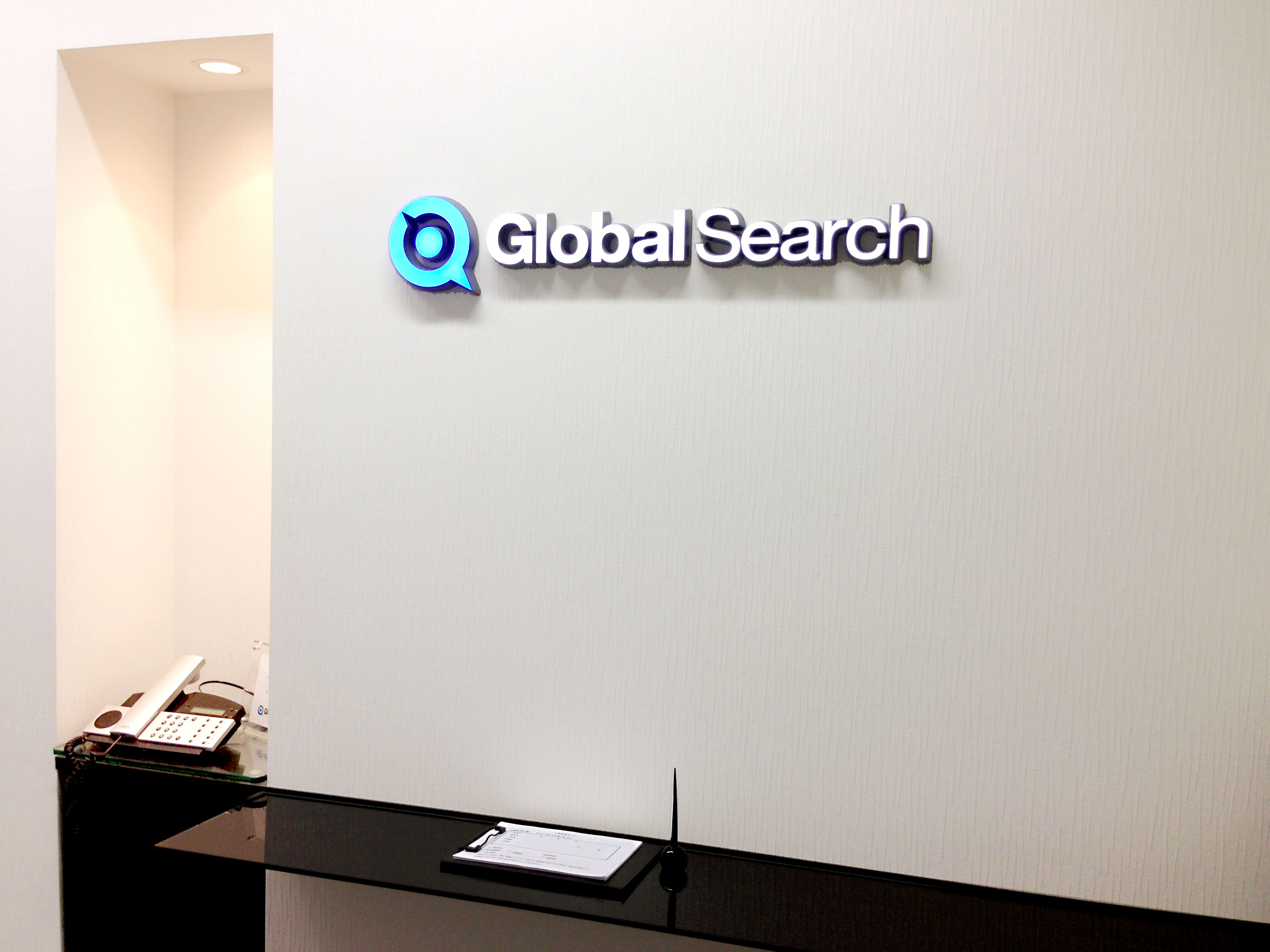 グローバルサーチ